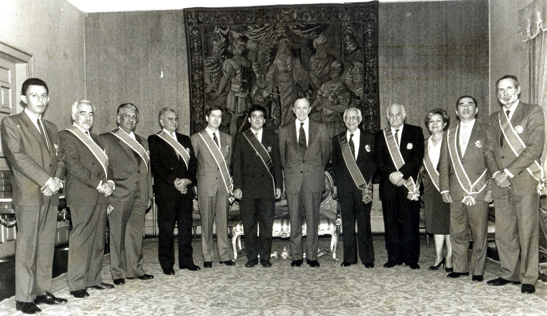 De izquierda a derecha. Edgar C. Otálvora, Alberto Lizarralde, Omar Baralt Mendez, Elías Castro Correa, Andrés Duarte Vivas, el ministro venezolano Roberto Smith Perera, el canciller colombiano Luis Fernando Jaramillo, Ramón J. Velásquez, Pompeyo Márquez, Teo Camargo, Valmore Acevedo Amaya y Guillermo Colmenares Finol en el Palacio de San Carlos en Bogotá, Colombia.